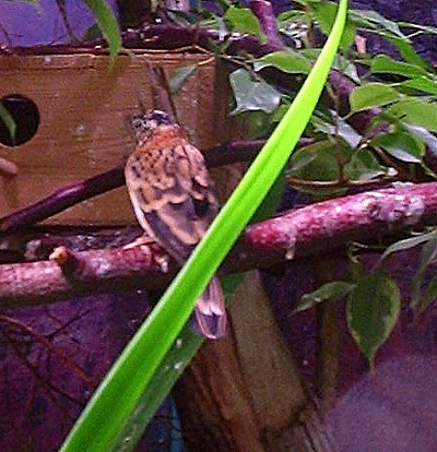 Vidua obtusa, female